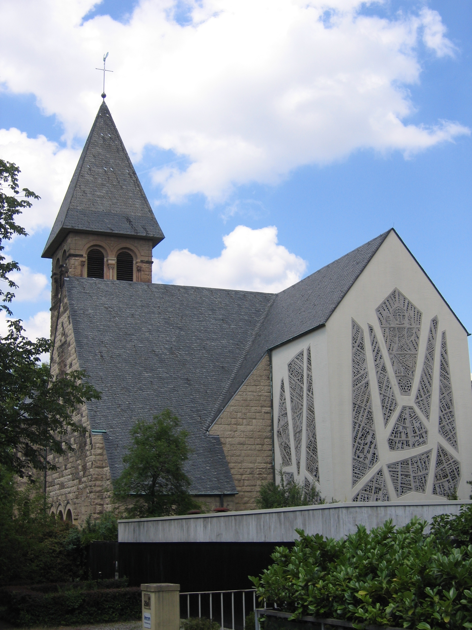 Evangelische Kirche in Köln-Marienburg This is a photograph of an architectural monument.